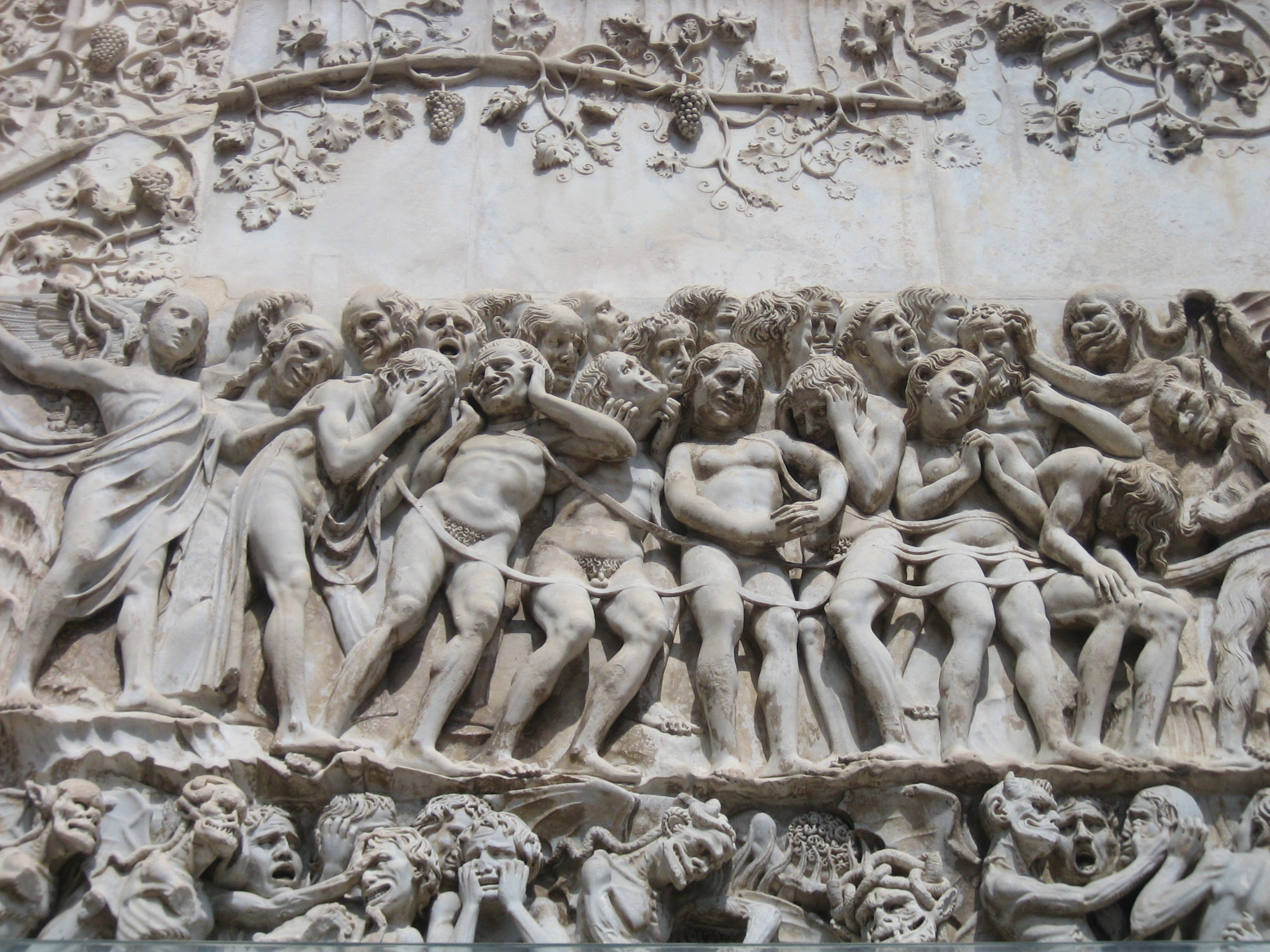 particolare delle decorazioni del duomo di orvieto